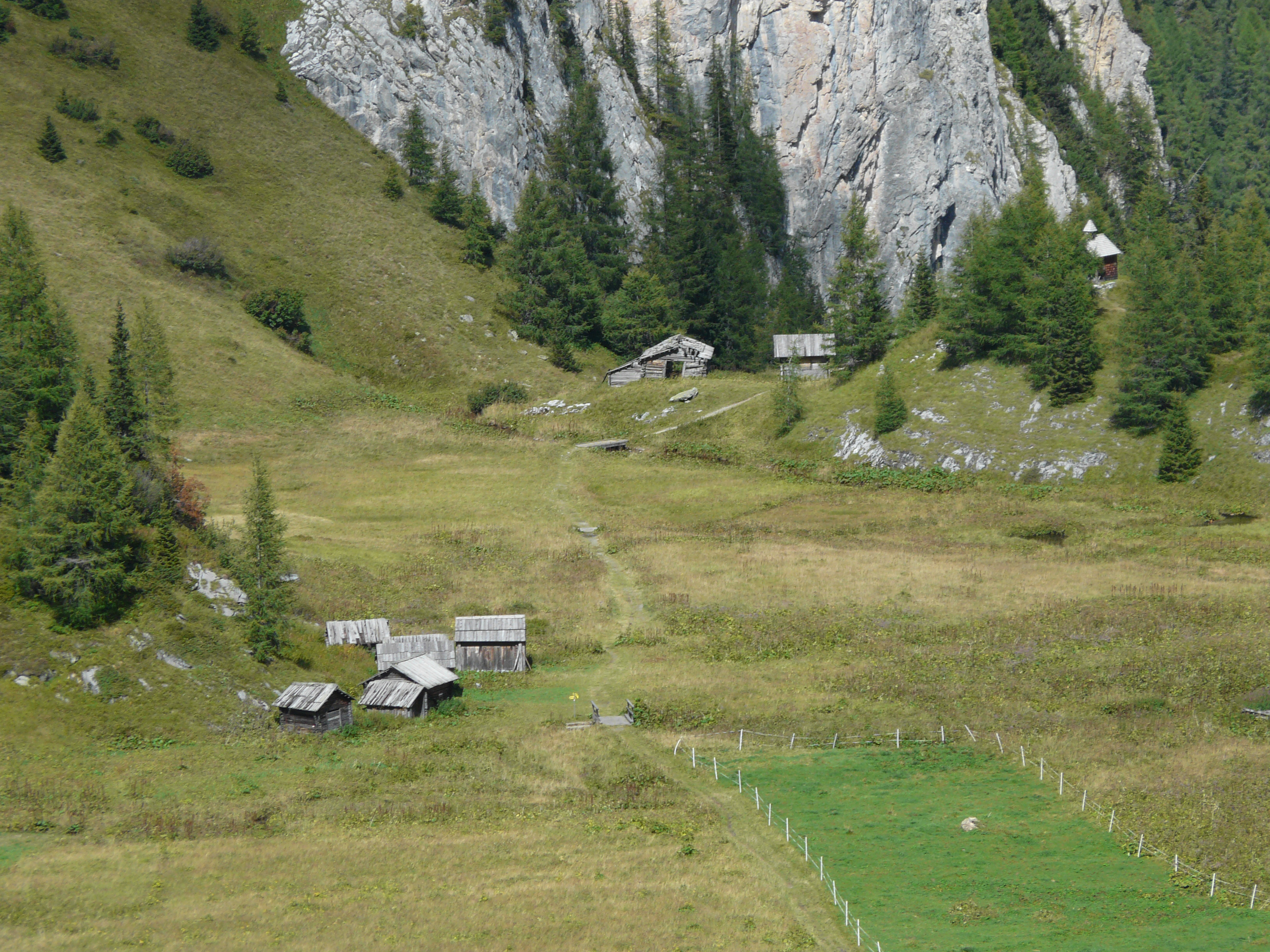 Das Almgebiet des Obstanser-Bodens mit der Prinz-Heinrich-Kapelle, nördlich der Obstanserseehütte.